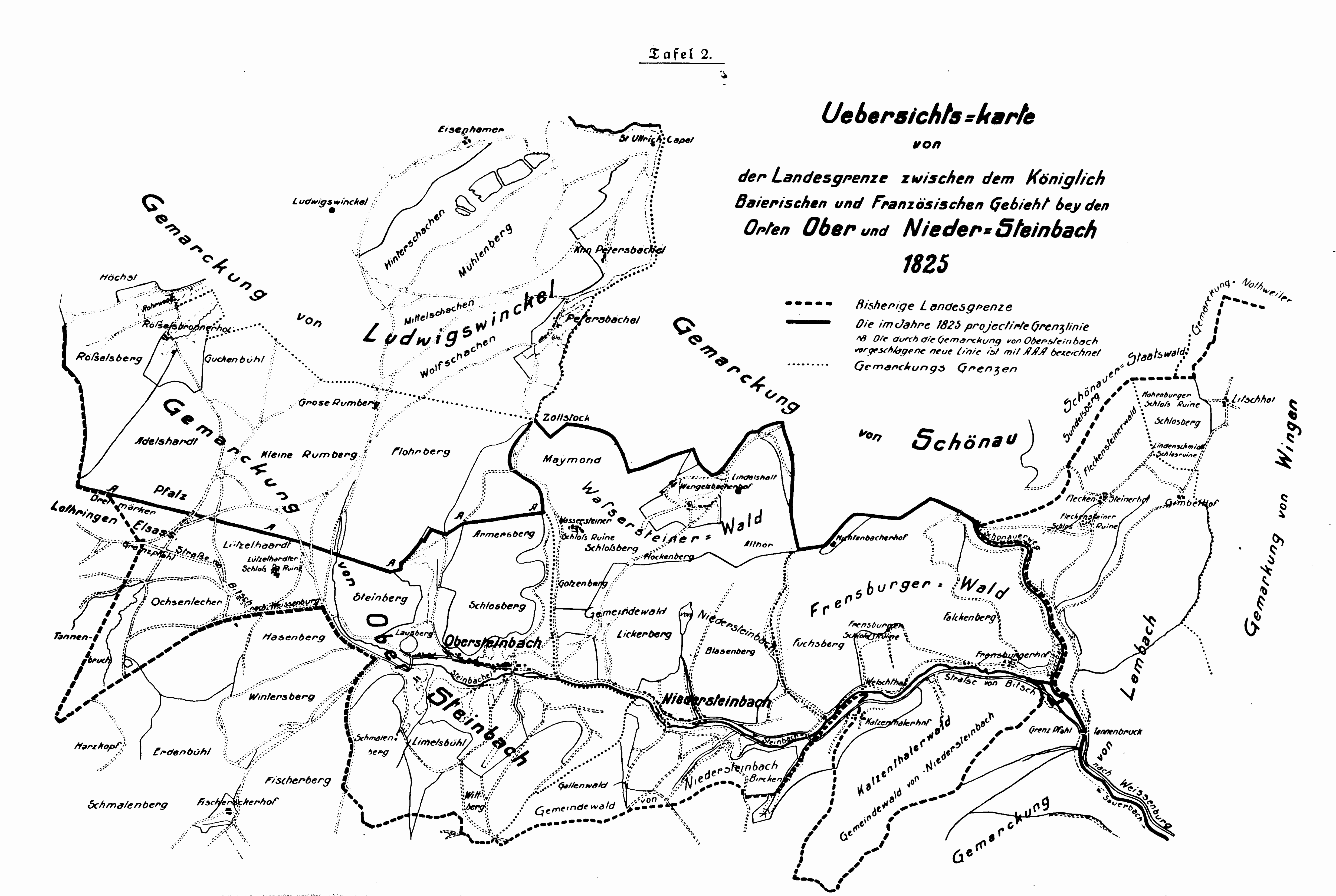 Die Übersichtskarte zeigt den Grenzbereich zwischen Bayern und Frankreich im Jahre 1825, der Gegenstand der Grenzverhandlugen war. Bis zu diesem Zeitpunkt war dieser Bereich bayerisches Staatsgebiet. Tafel 2 in der Buchmitte.